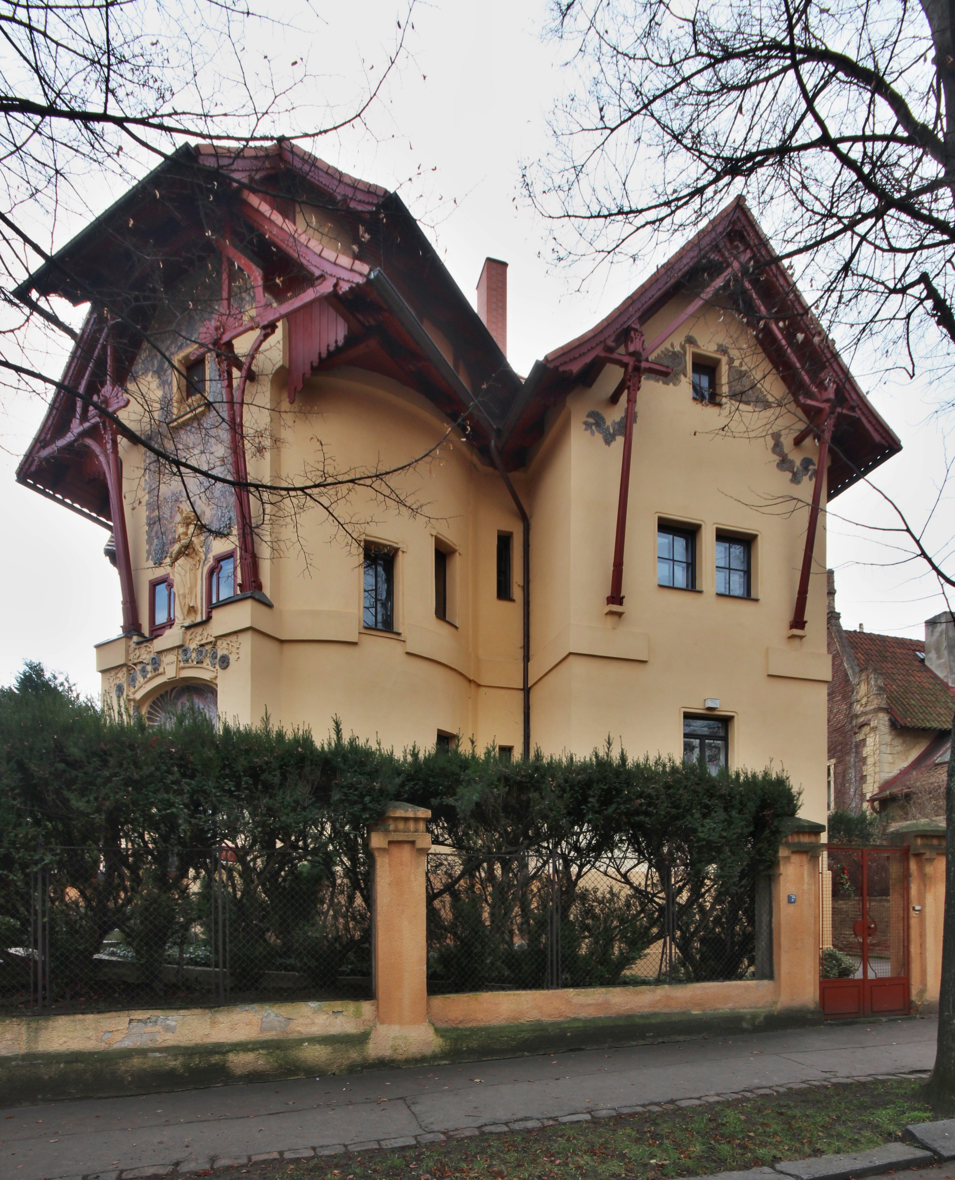 Maškova vila, 1901, spoluautoři: Bohumil Waigant, Antonín Waigant, Luděk Wurzl, Slavíčkova čp. 196/7, Praha 6 – Bubeneč